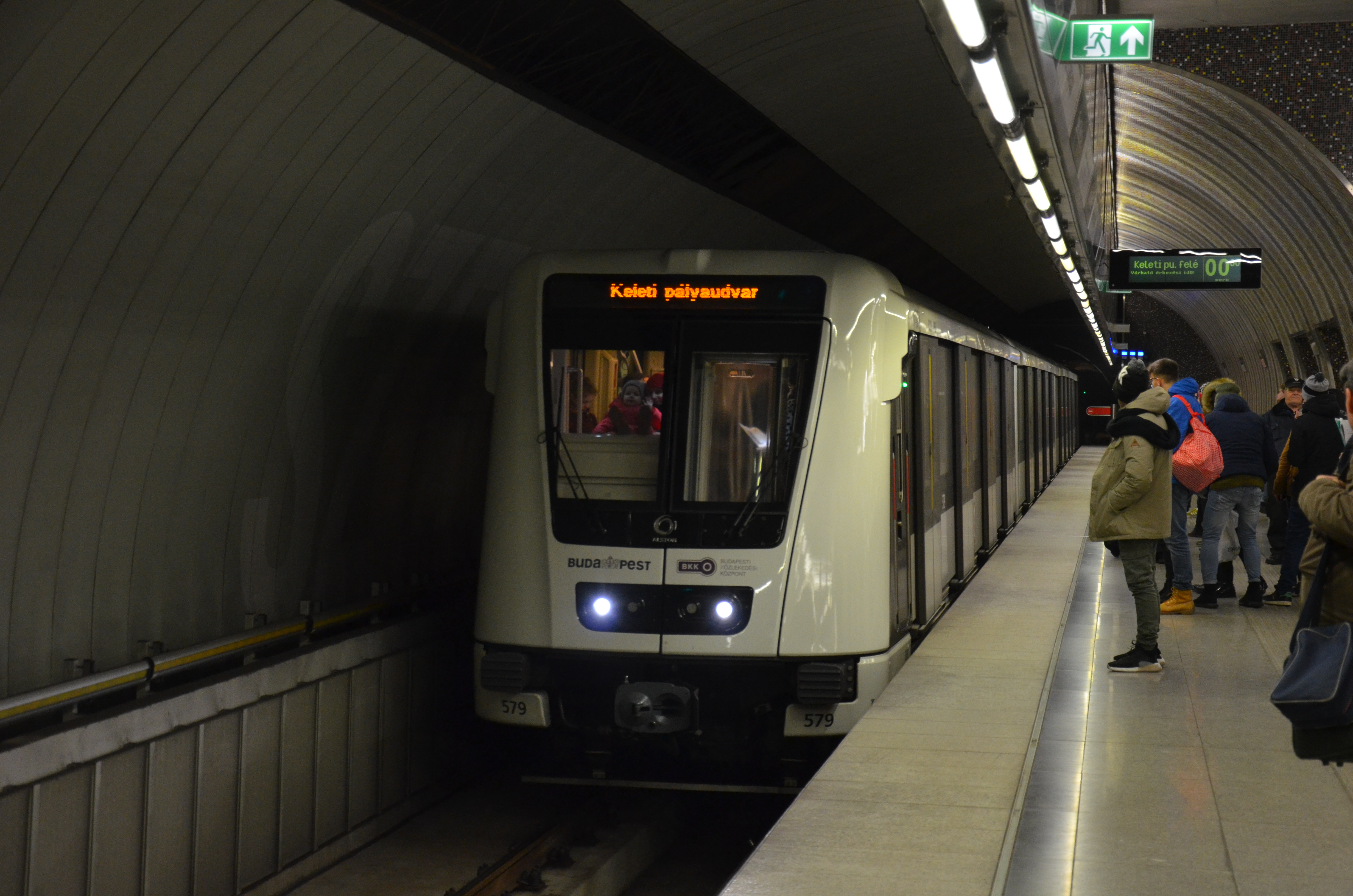 Rame automatique Alstom Metropolis à la station Szent Gellért tér de la ligne 4 du métro de Budapest.